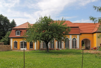 Orangerie vom Rittergut Benndorf